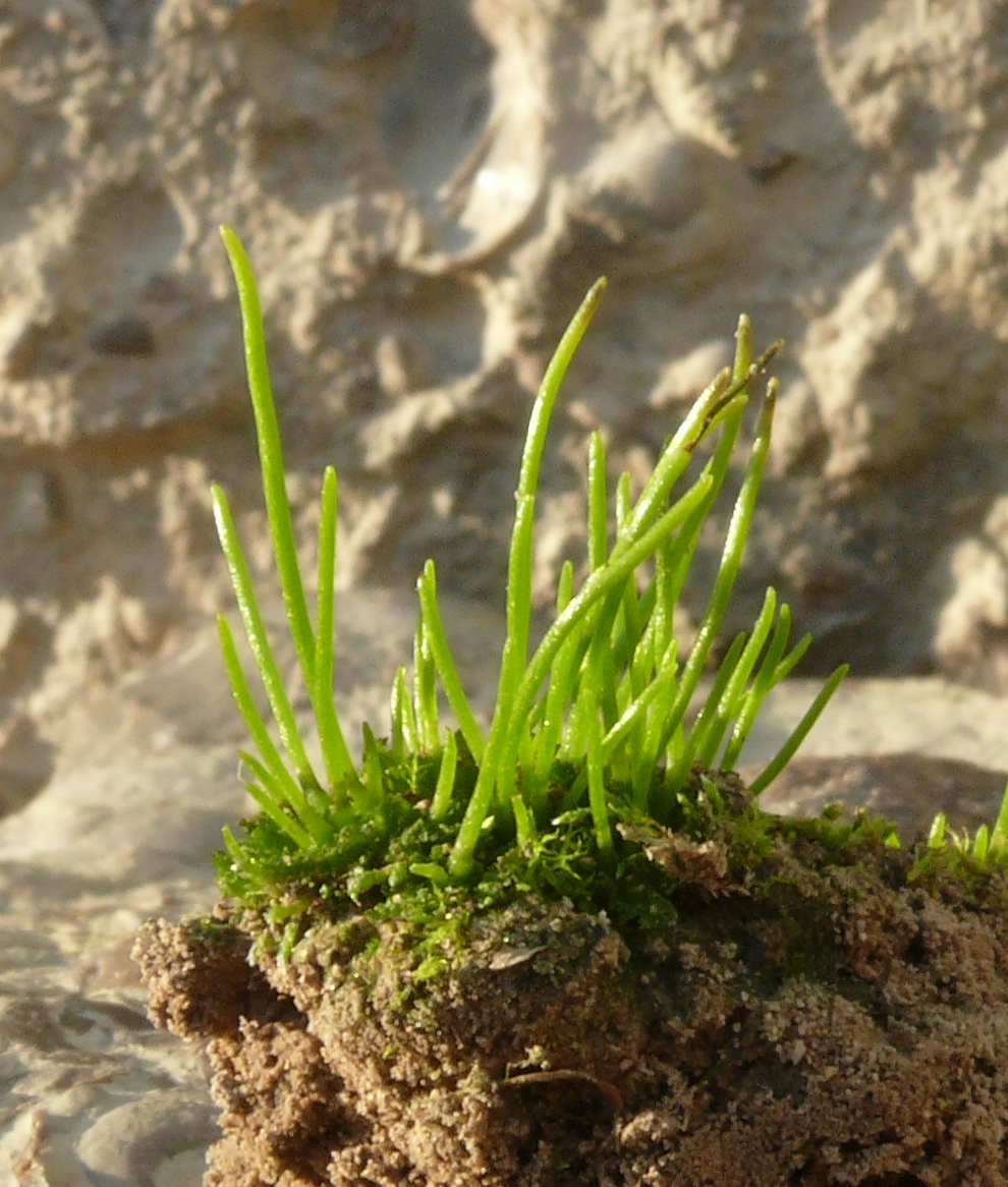 Anthoceros agrestis, Schwäbisch-Fränkische Waldberge, Deutschland